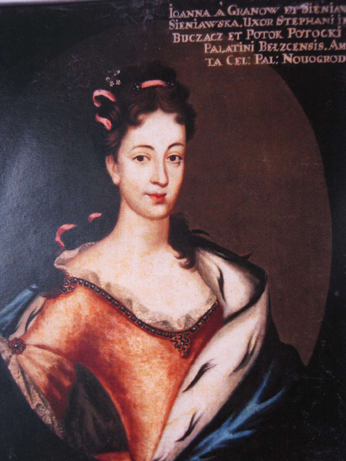 Йоанна Потоцька з Сєнявских (мама М.В.Потоцького - старости "Каньовського")